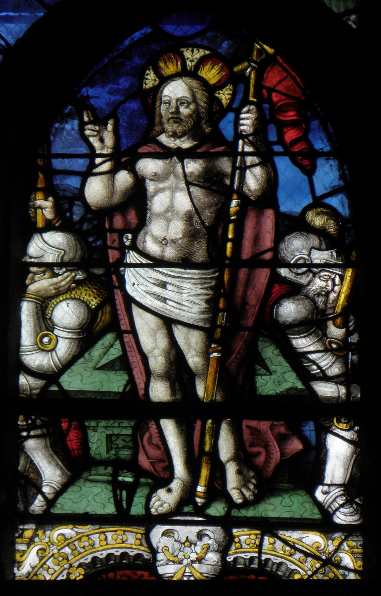 Maîtresse-vitre de l'église Saint-Yves de La Roche-Maurice (29).